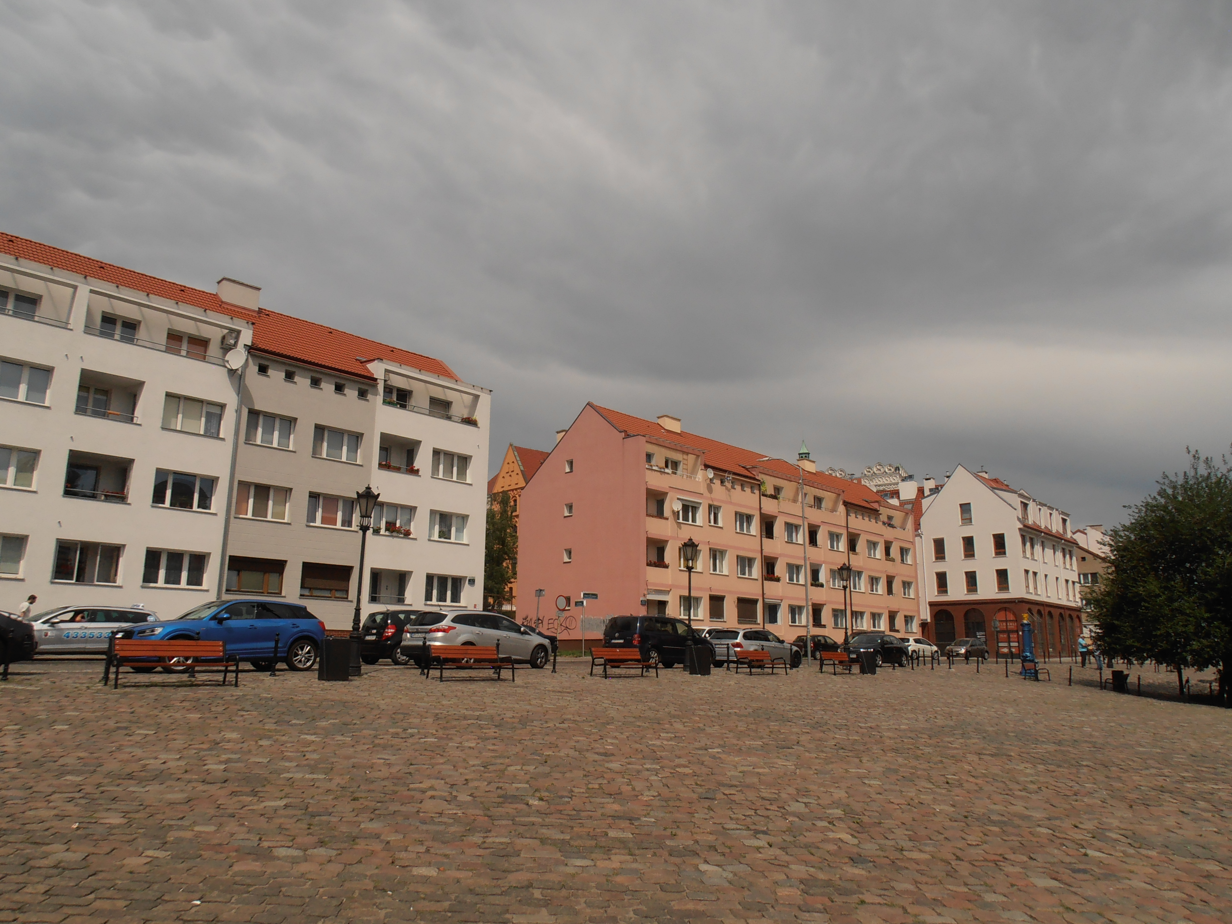 Rynek Sienny w Szczecinie, 2018 r.